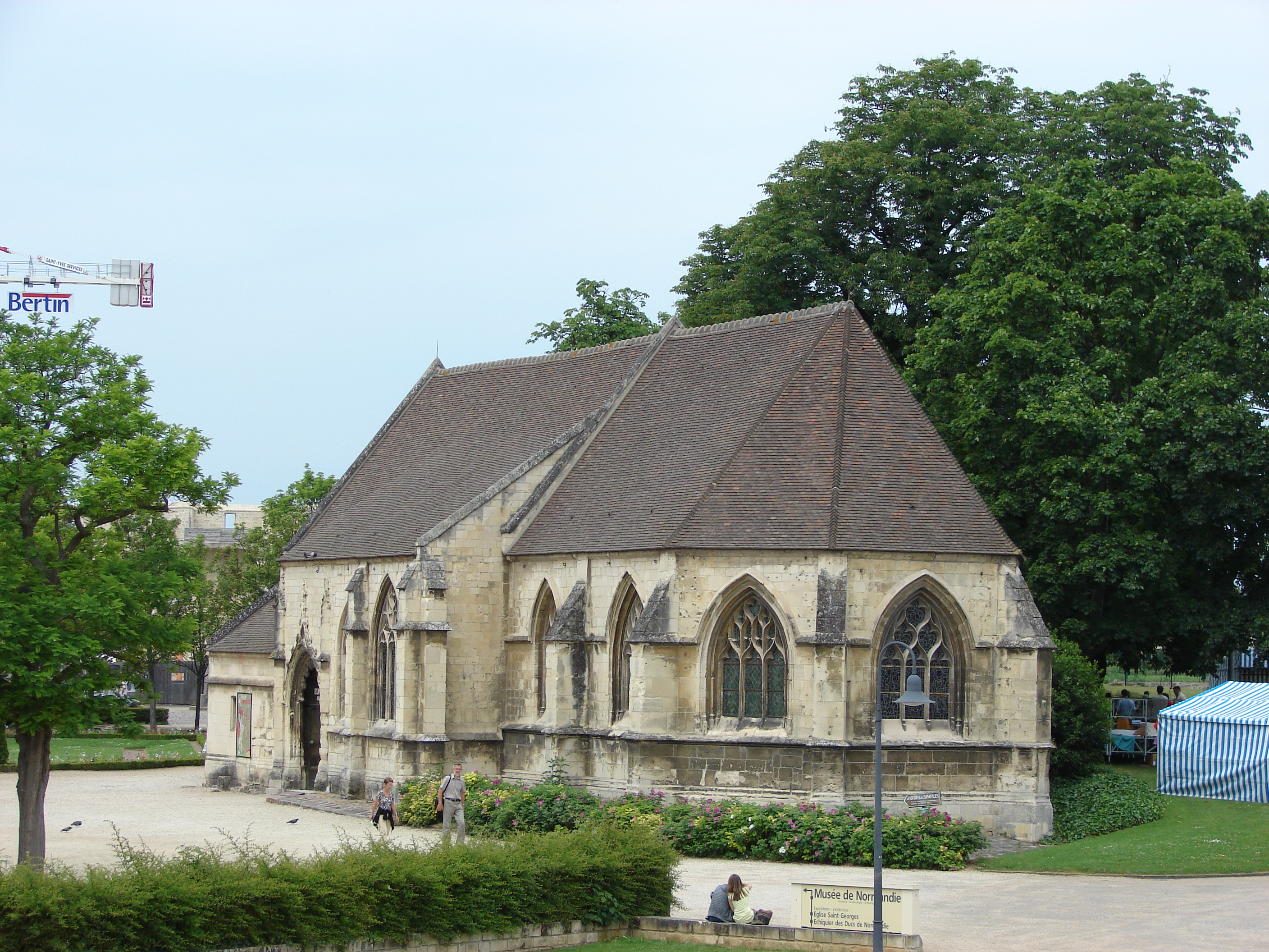 L'ancienne église Saint-Georges